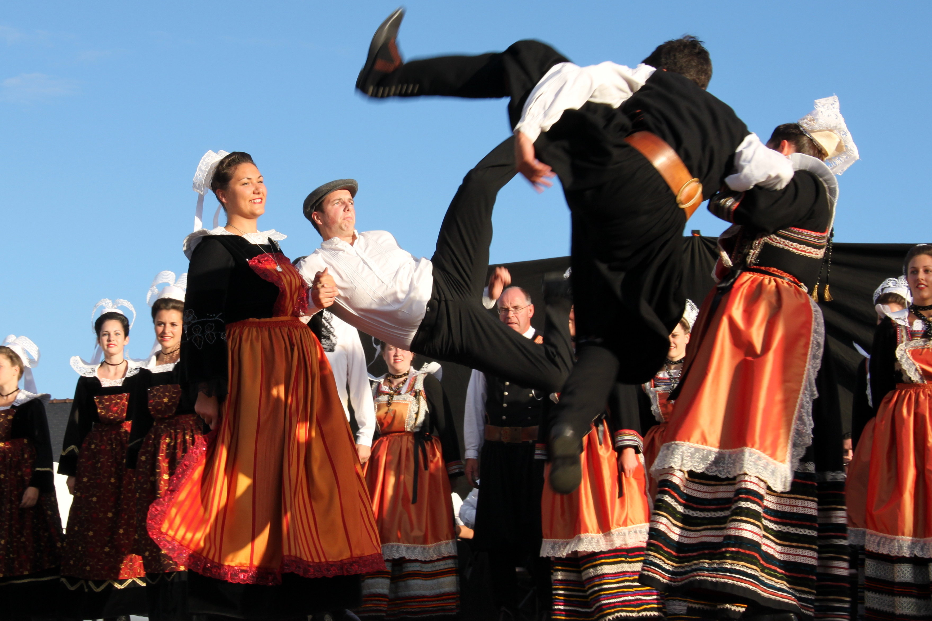 Riec sur Belon - Le cercle celtique Bleuniou Lann an Aven